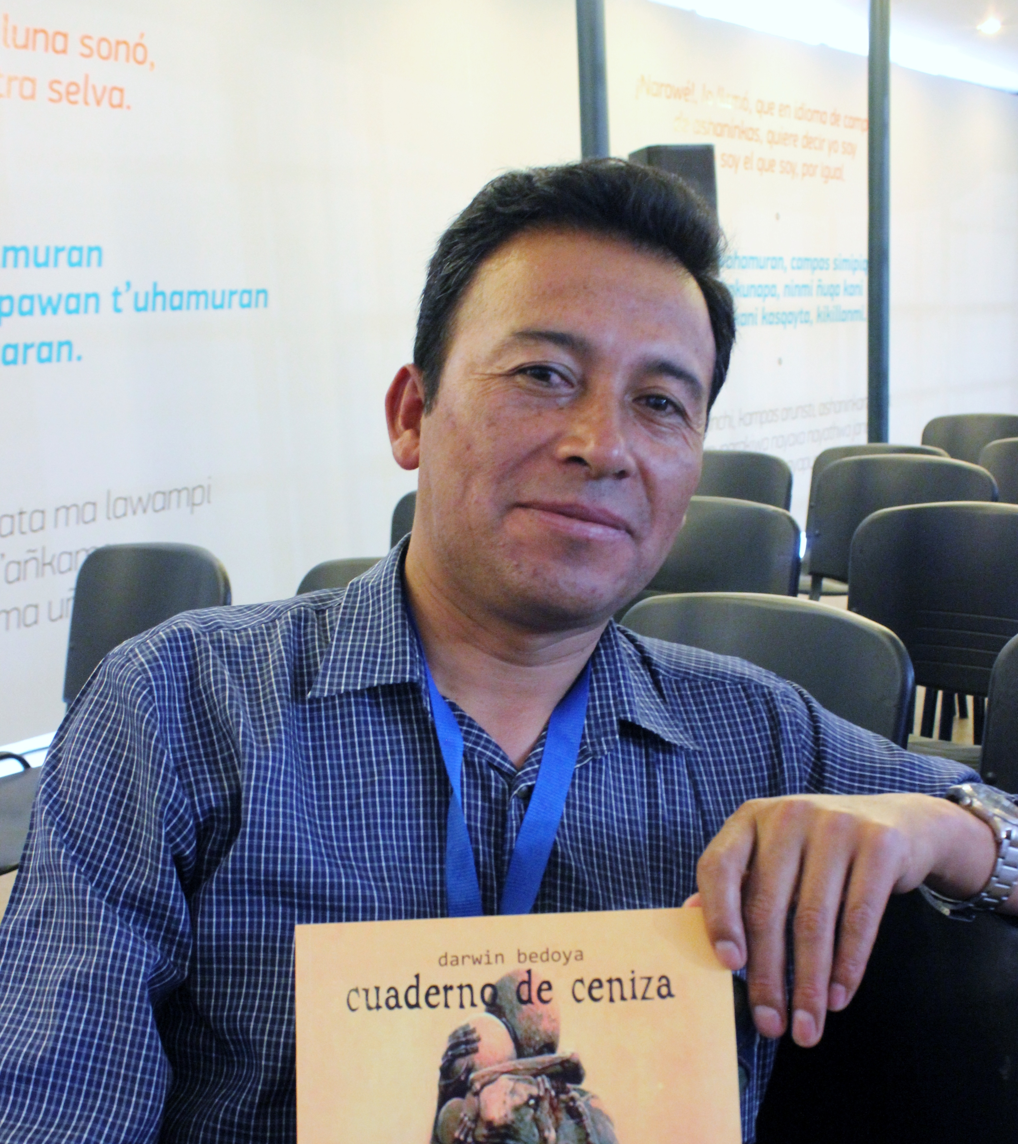 El poeta peruano Darwin Bedoya (Perú, 1974) en la Feria Internacional del Libro de Santiago 2018.